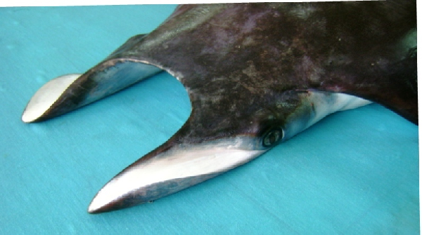 скат рода мобул